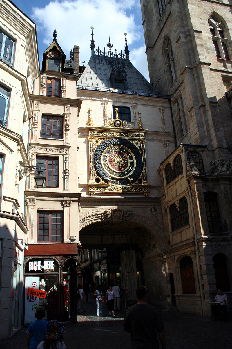 Le Gros Horloge, Rouen, France